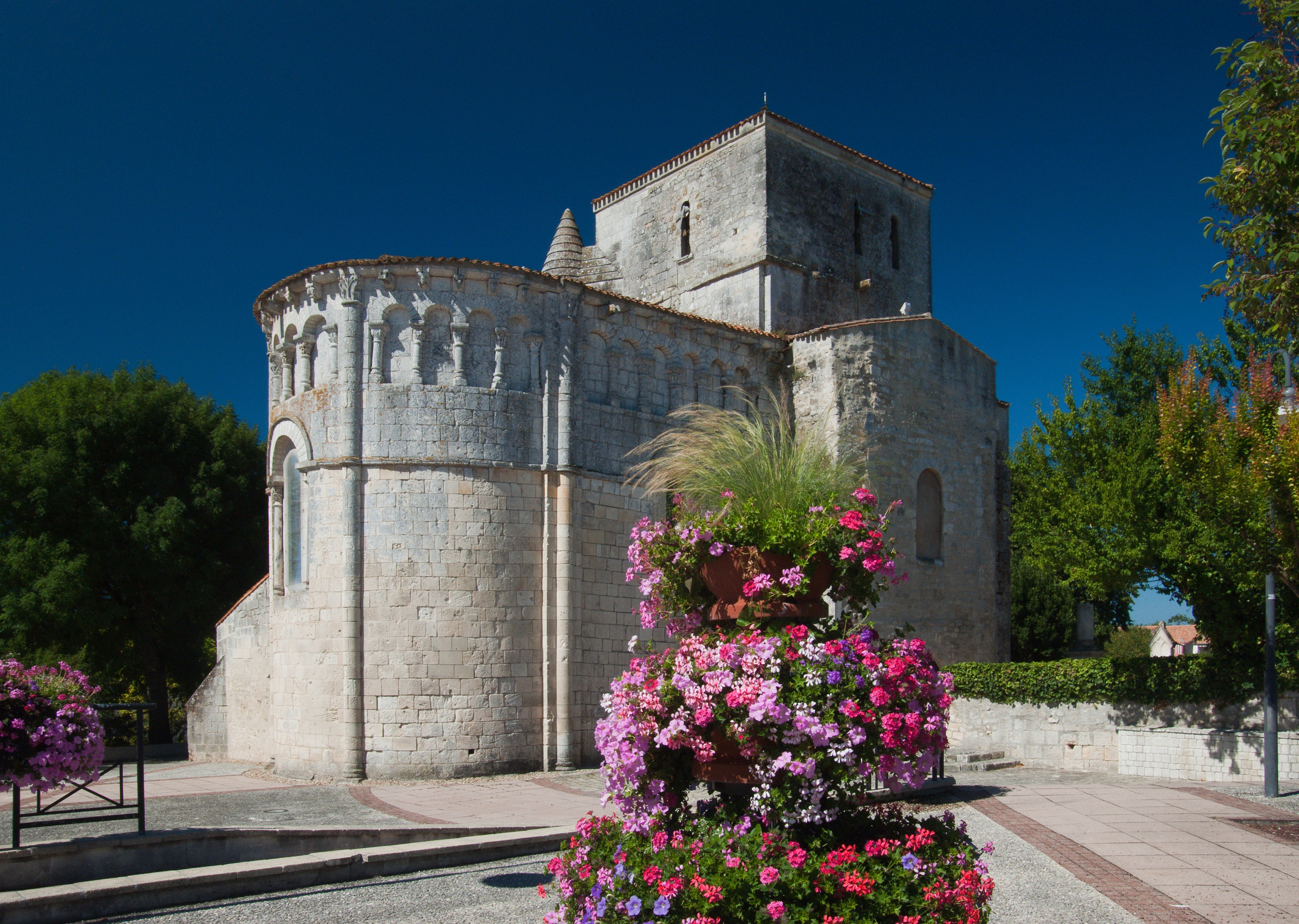 Eglise St Etienne à Vaux sur Mer .